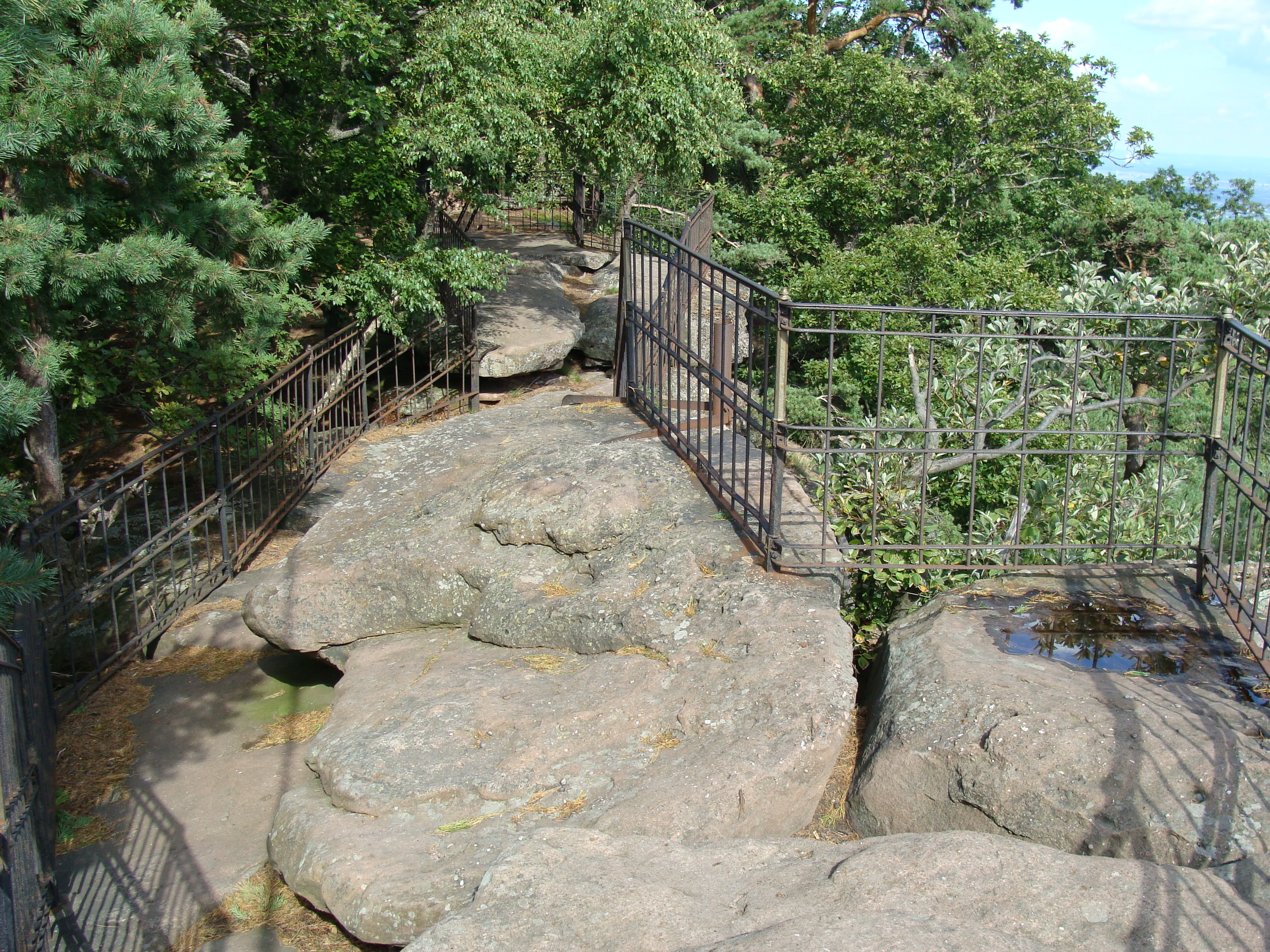 Orensfelsen am Orensberg im Pfälzerwald